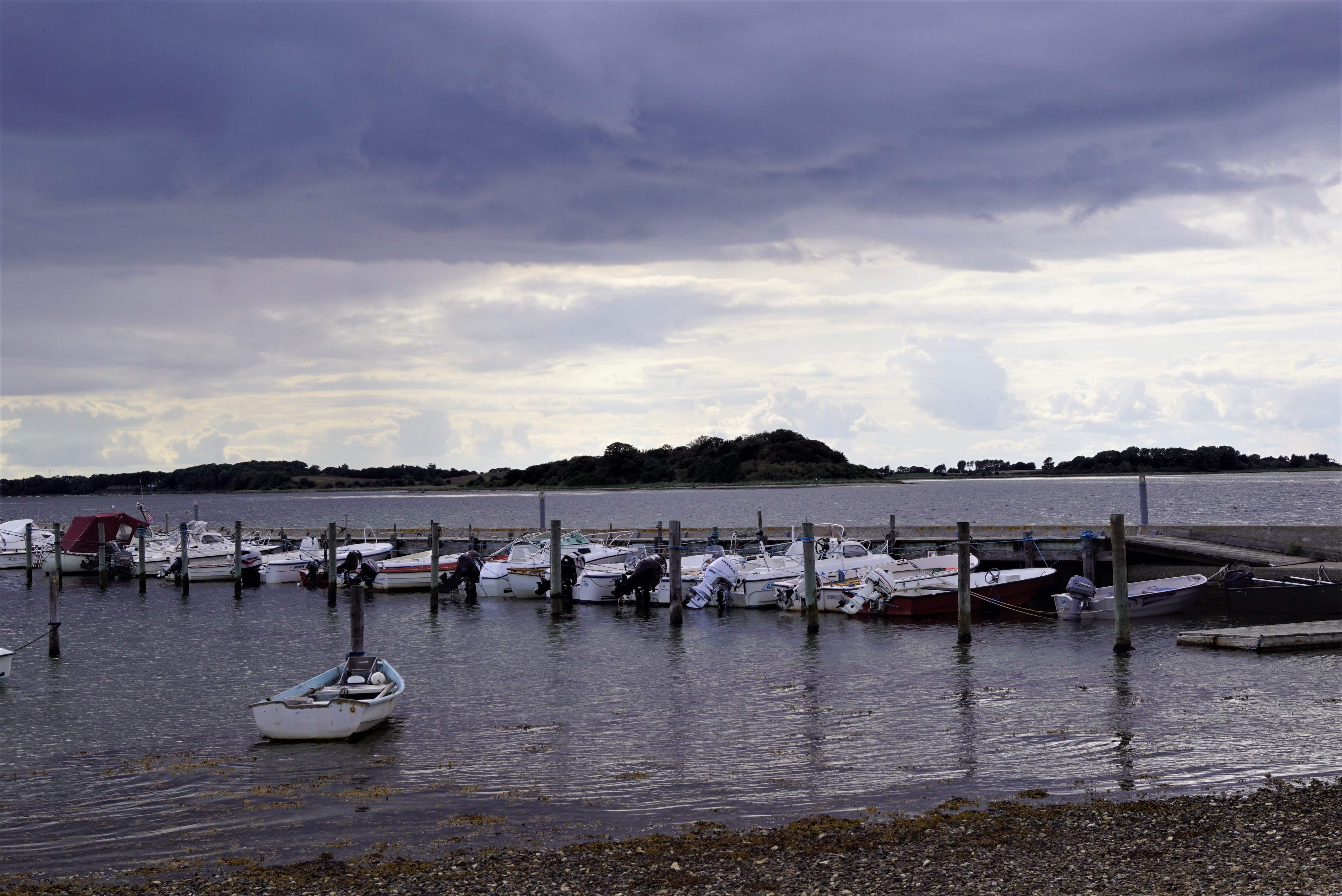 Stavns Fjord set mod sydvest fra Langøre